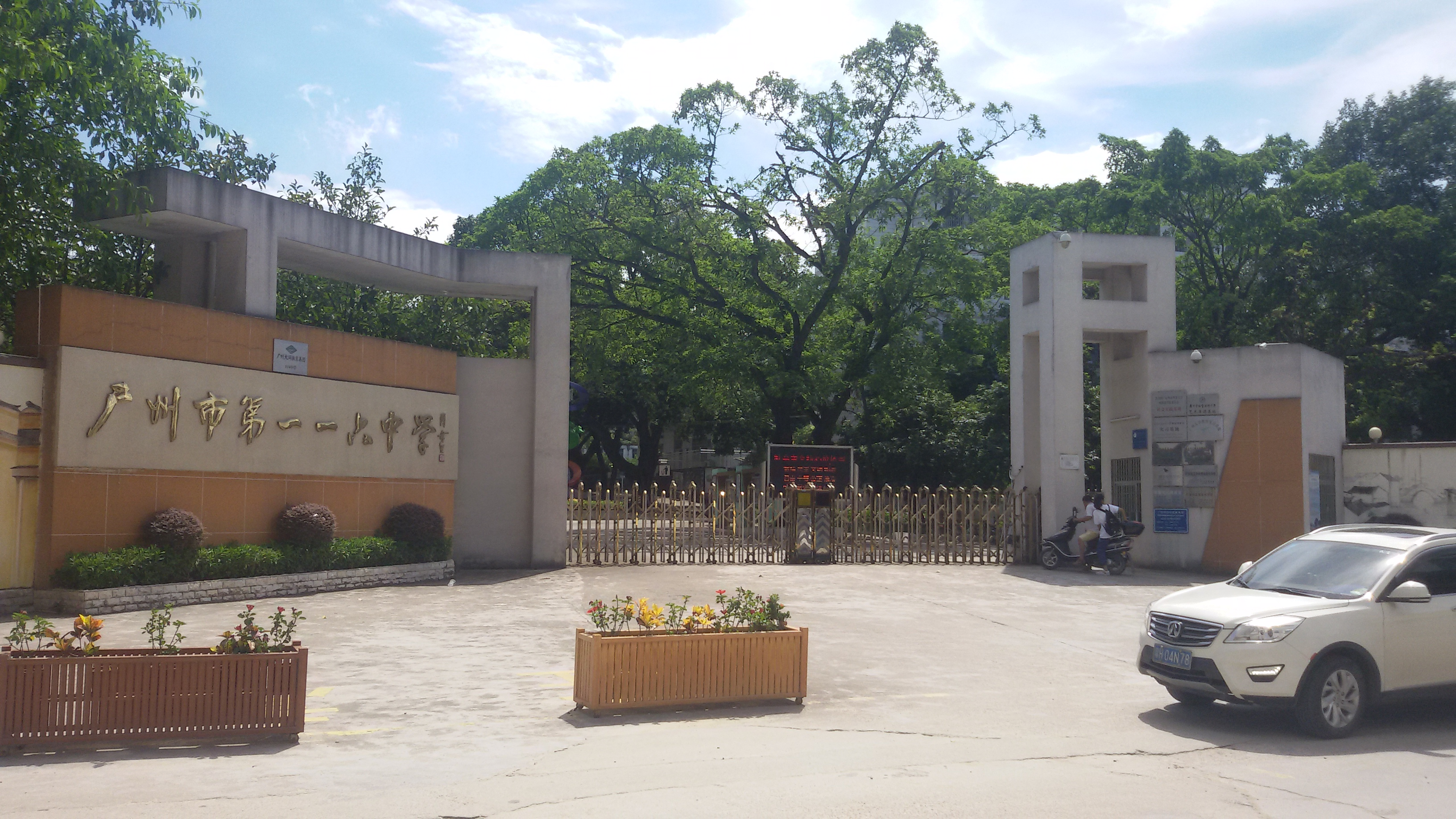 粵語: 廣州市第116中學大門